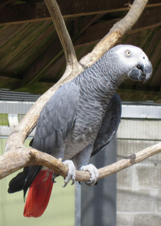 Graupapagei (Psittacus erithacus)